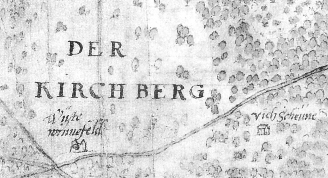 Wüstung Winnefeld auf der Sollingkarte von Johannes Krabbe von 1603